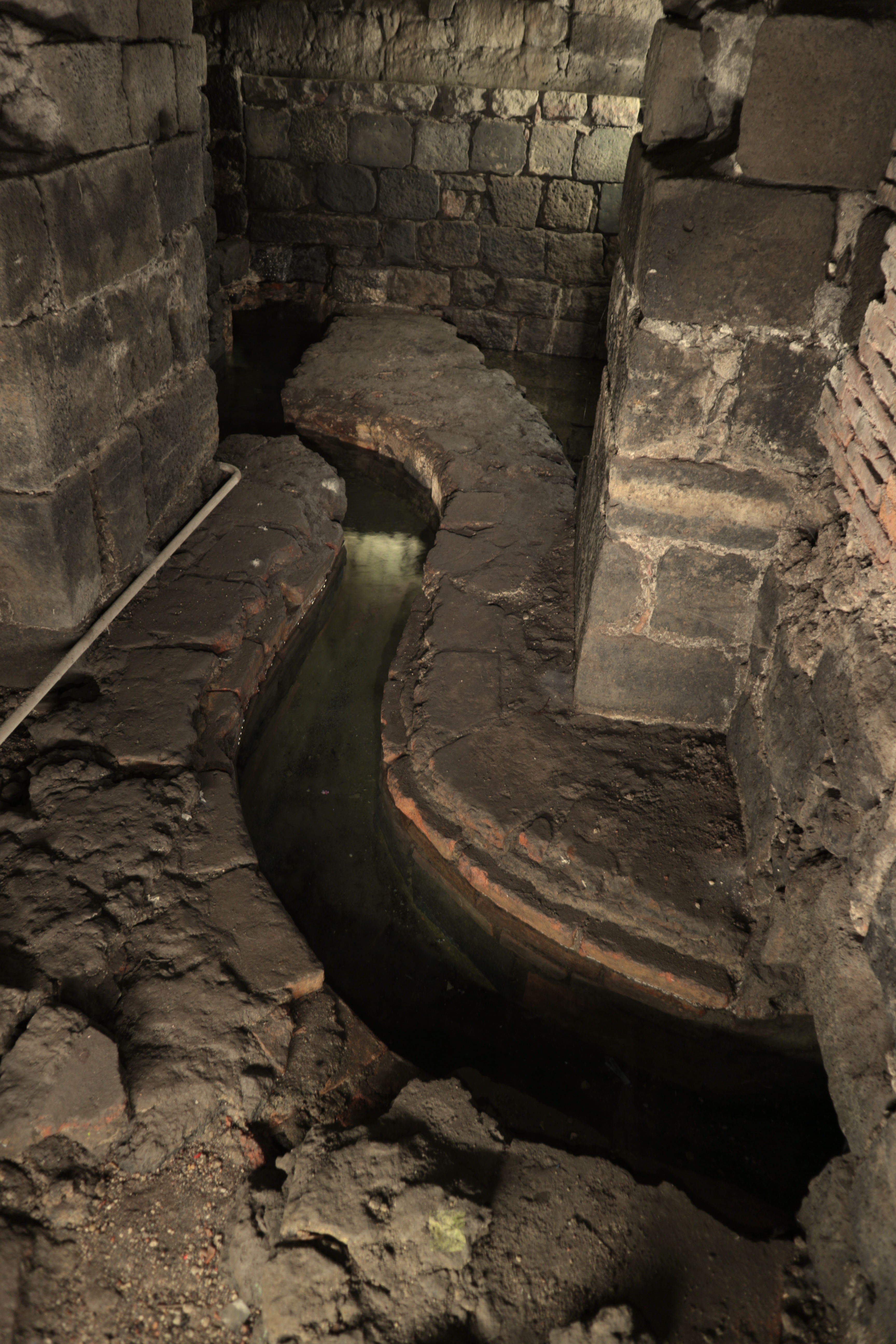 Terme Achilliane di Catania